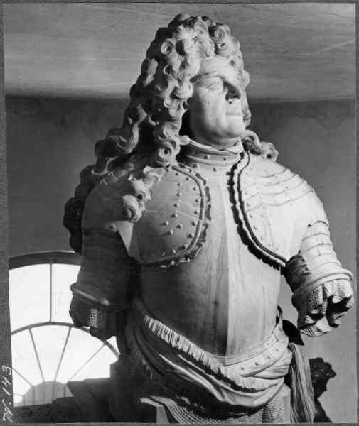 Grav, J. J. Hastfers gravkor, avliden 1695, detalj, marmorbyst, möjligen utförd av Andreas Schlüter. Kategori: (09) Gravar Grav, J. J. Hastfers gravkor, avliden 1695, detalj, marmorbyst, möjligen utförd av Andreas Schlüter. Eller utförd av bildhuggaren Kaspar Schröder (1652-1695).